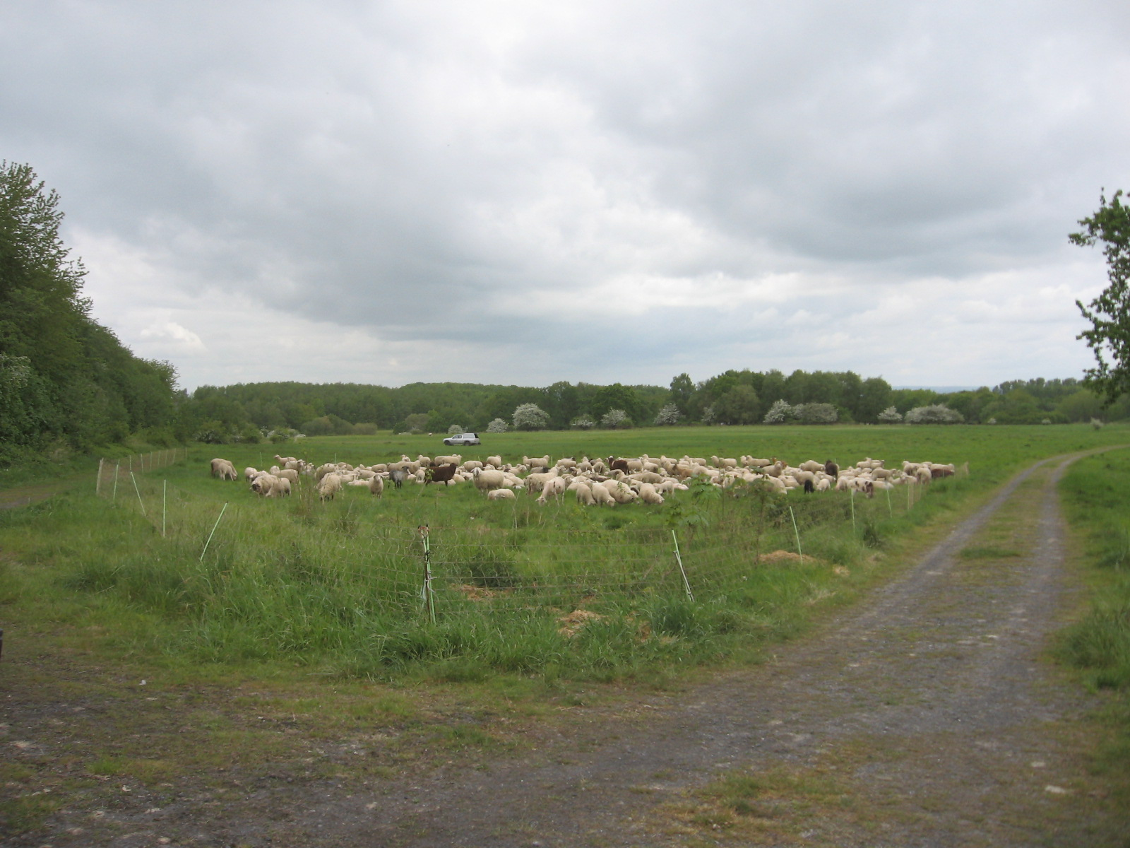 Nordwestliche Bereich vom Naturschutzgebiet Standortübungsplatz bei Büecke mit Schafherde.